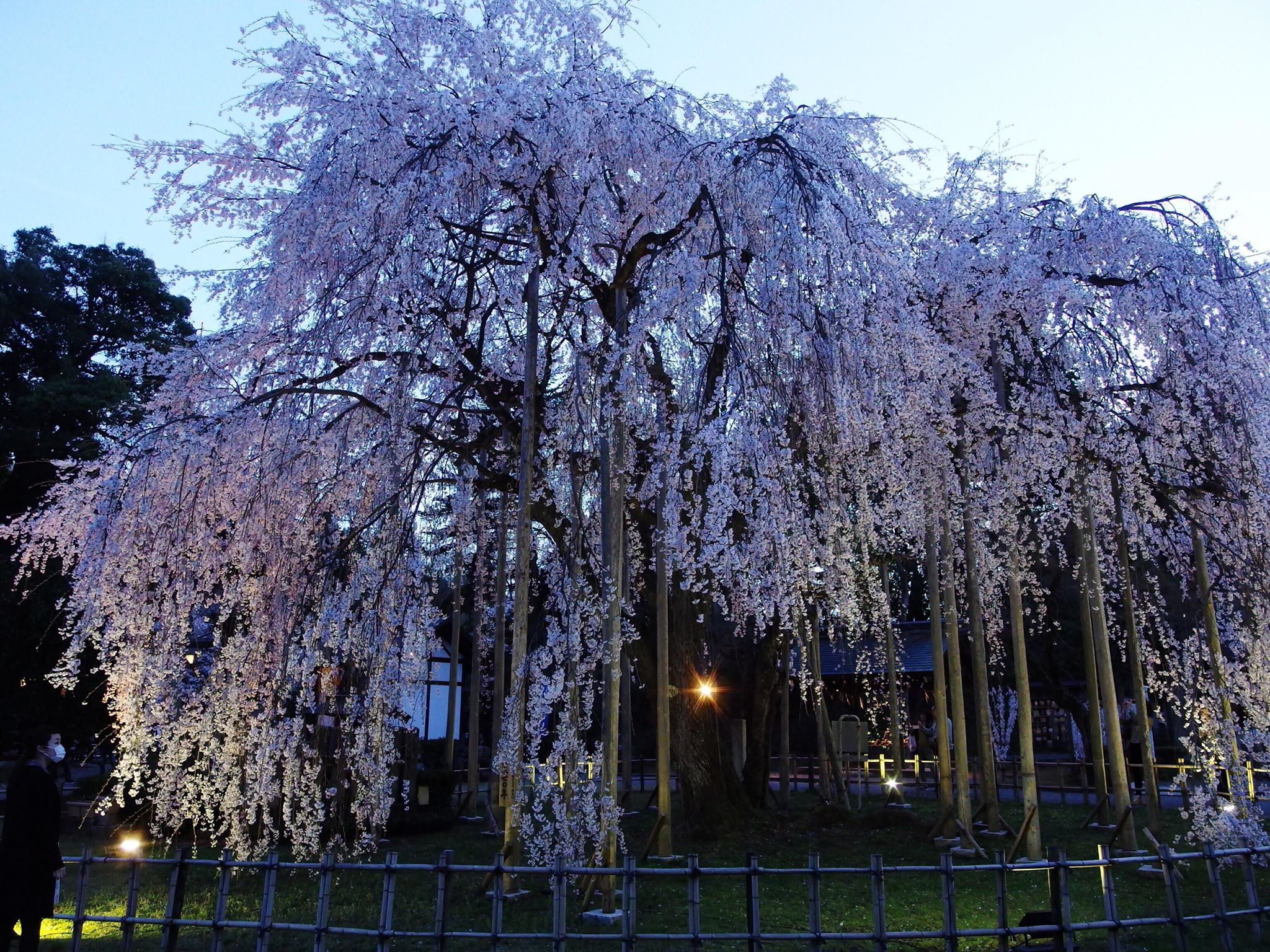 足羽神社にあるしだれ桜